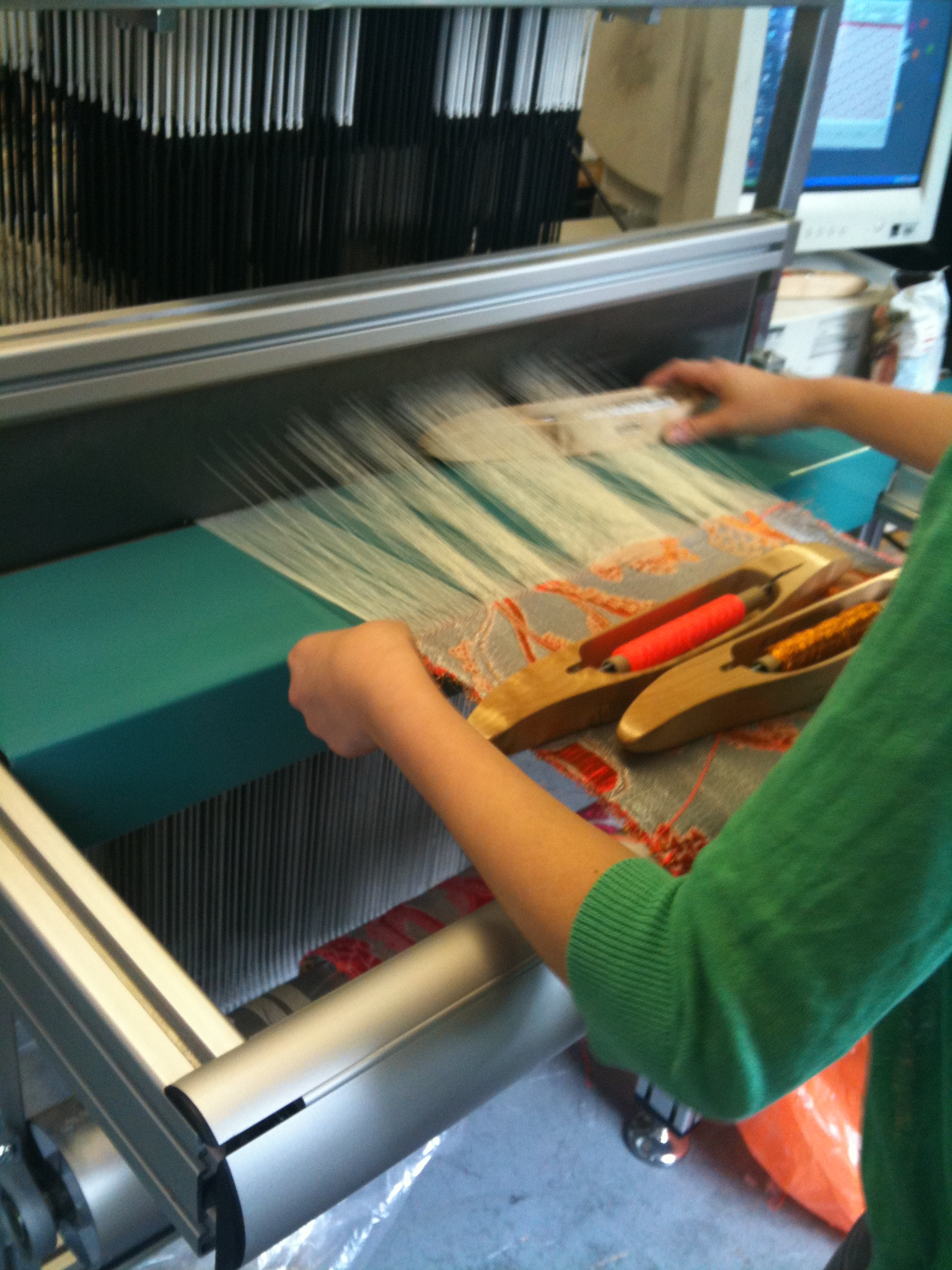 Métier à tisser